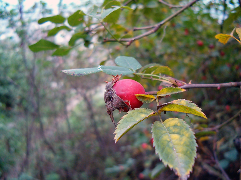 = Лицензиране: ==